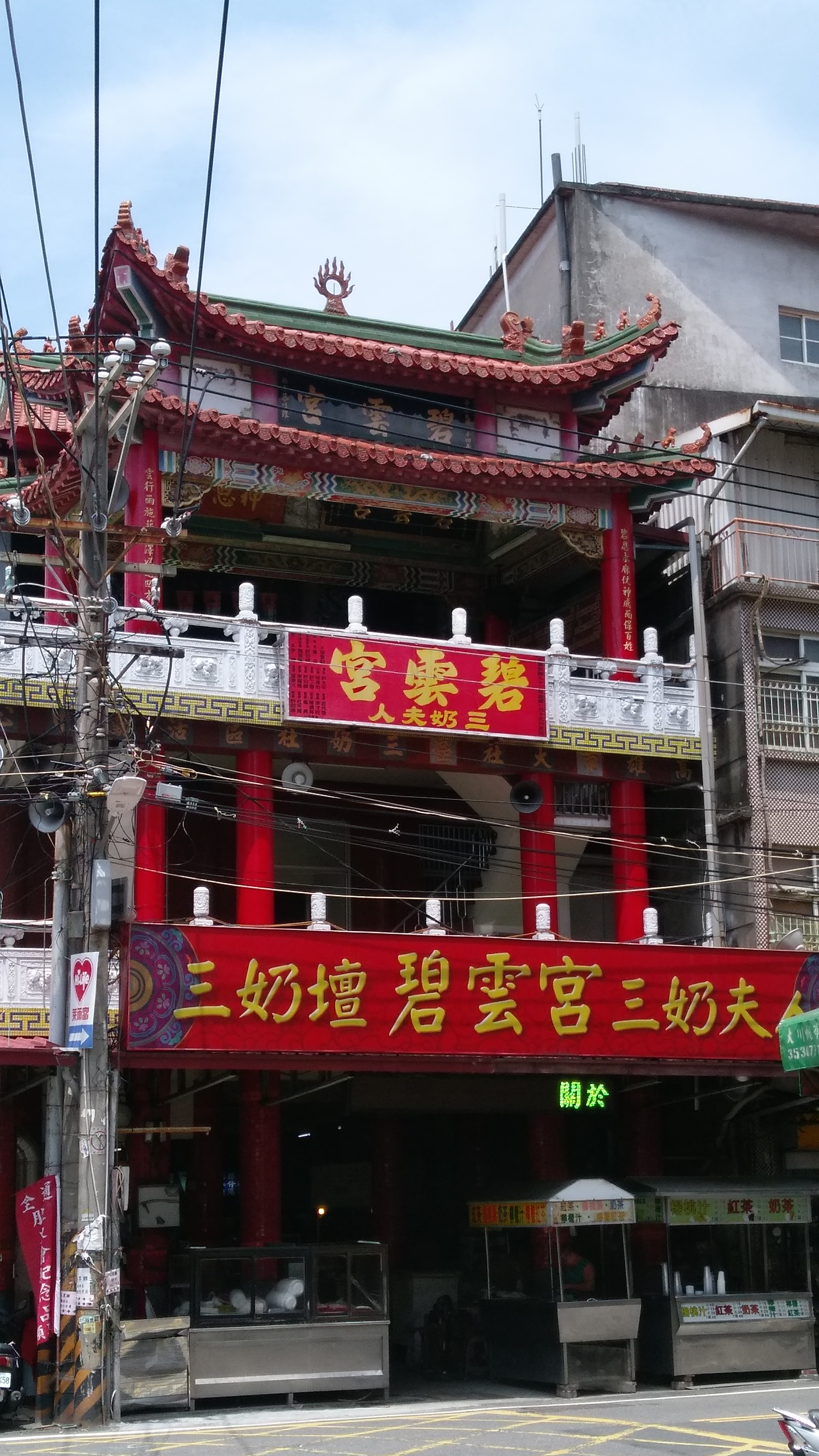 中文（台灣）: 大社區三奶壇碧雲宮全景